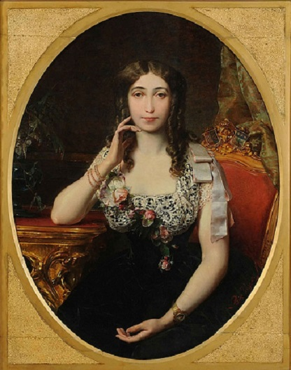 Ritratto di Olimpia Rossi Savio (1815-1889), olio su tela, 109x79 cm, Museo del Risorgimento, Torino